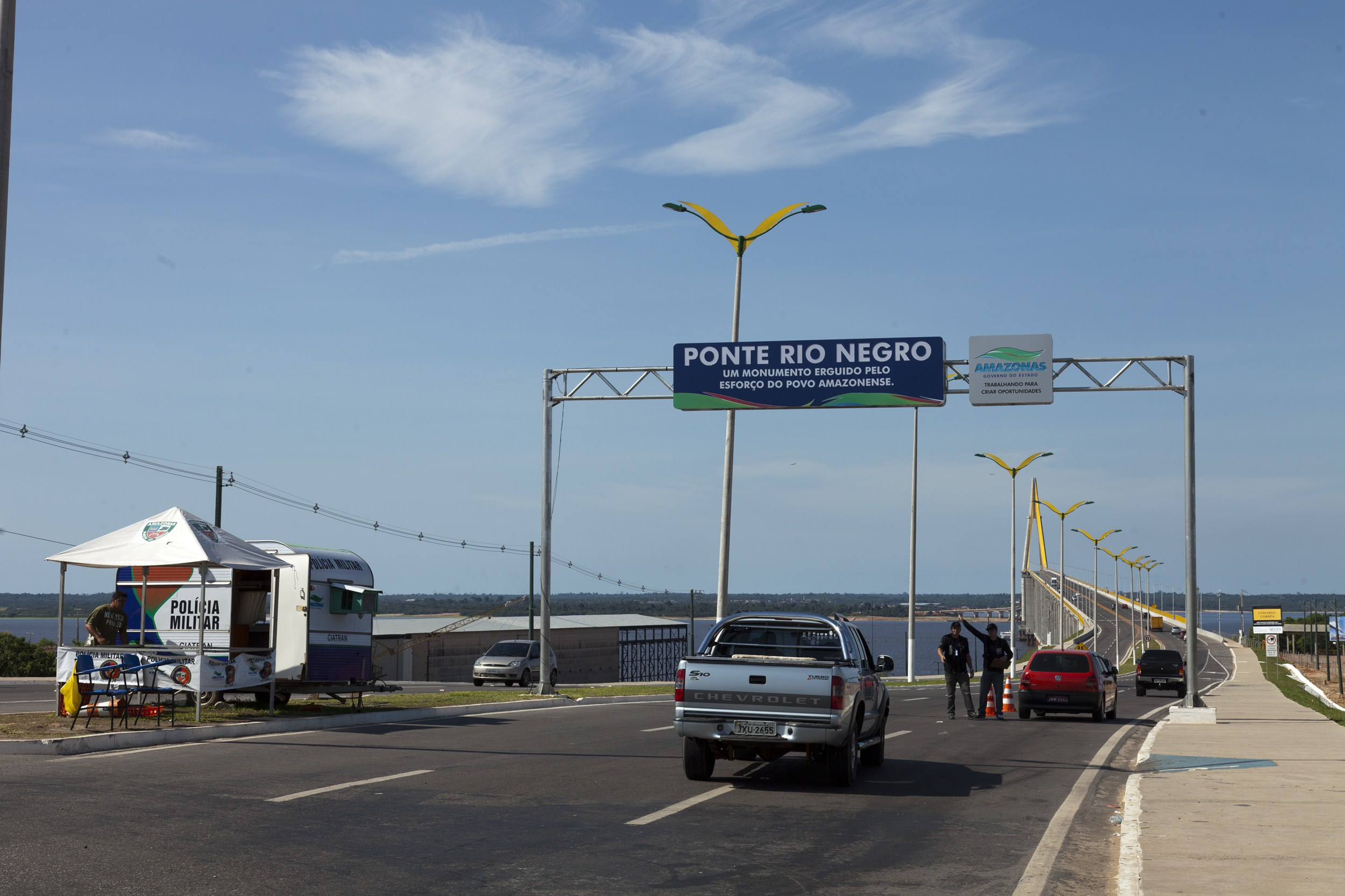 Rodovia Manoel Urbano, acesso à Ponte Rio Negro.